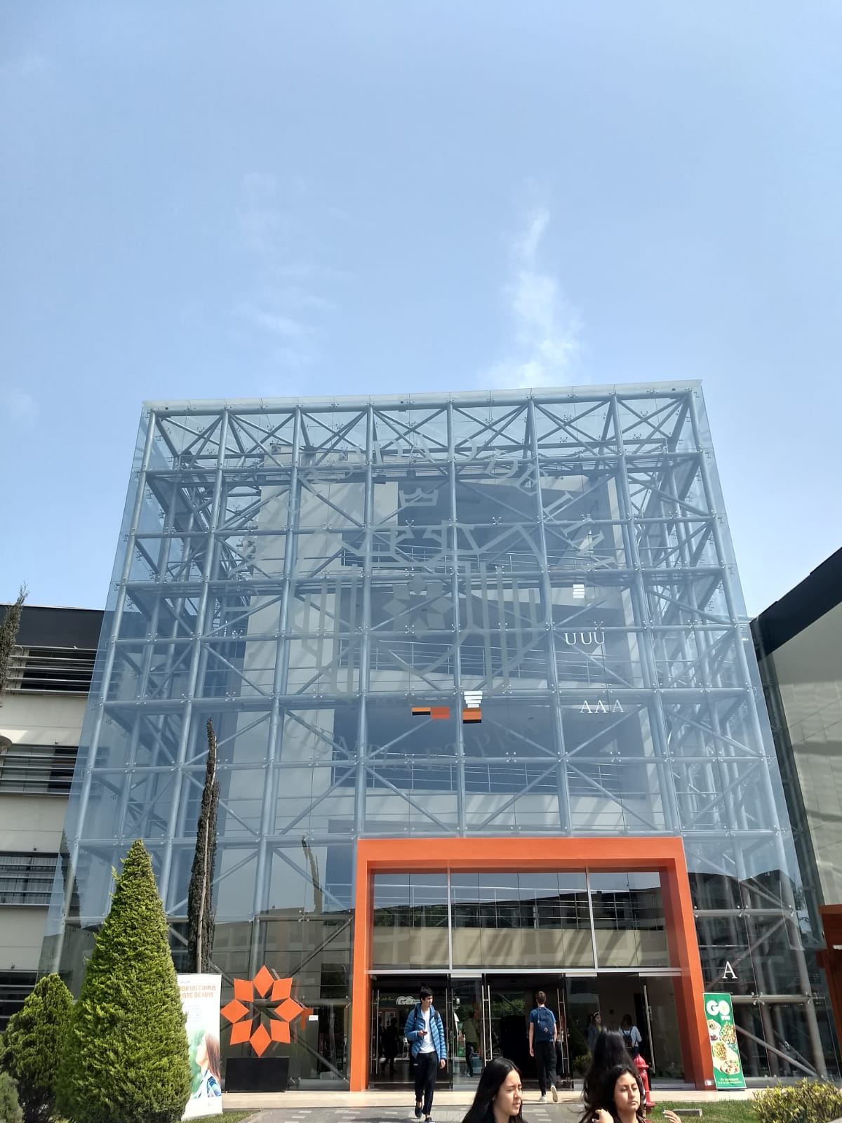 Pabellon R